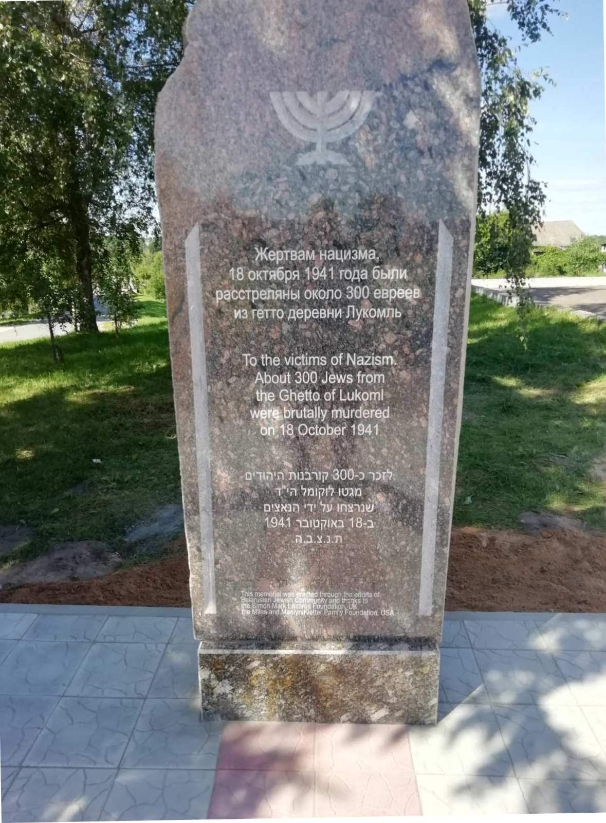 Новый памятник убитым во время Холокоста евреям деревни Лукомль Чашникского района Витебской области Беларуси. Установлен в августе 2020 года.